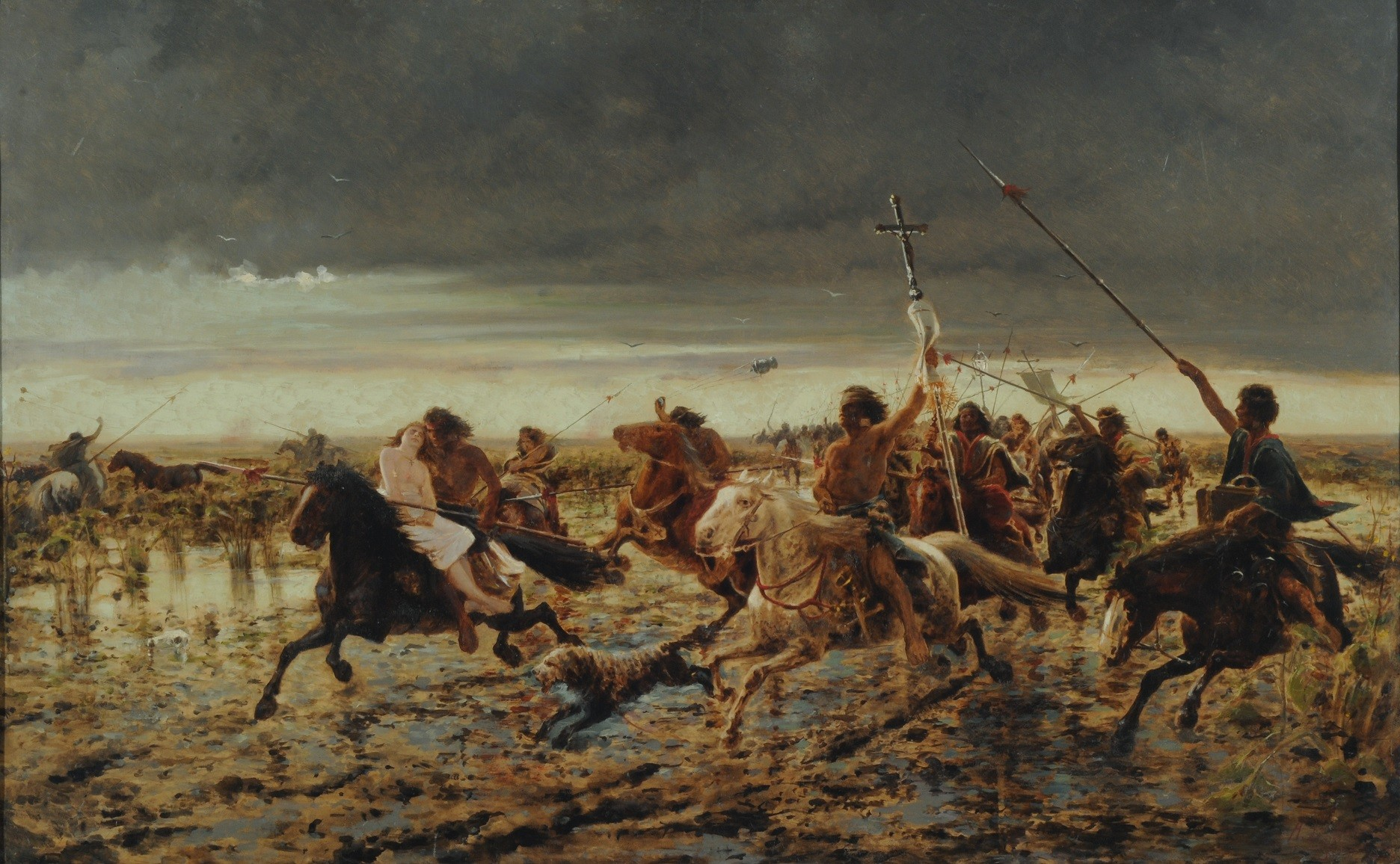 Ángel della Valle, La vuelta del malón (boceto). 1892. 50,3 x 80 cm, óleo sobre cartón sobre madera. Inv. 6658.